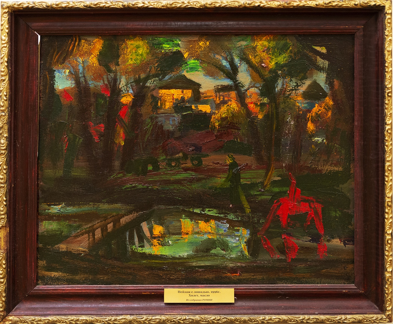 из собрания РОМИИ